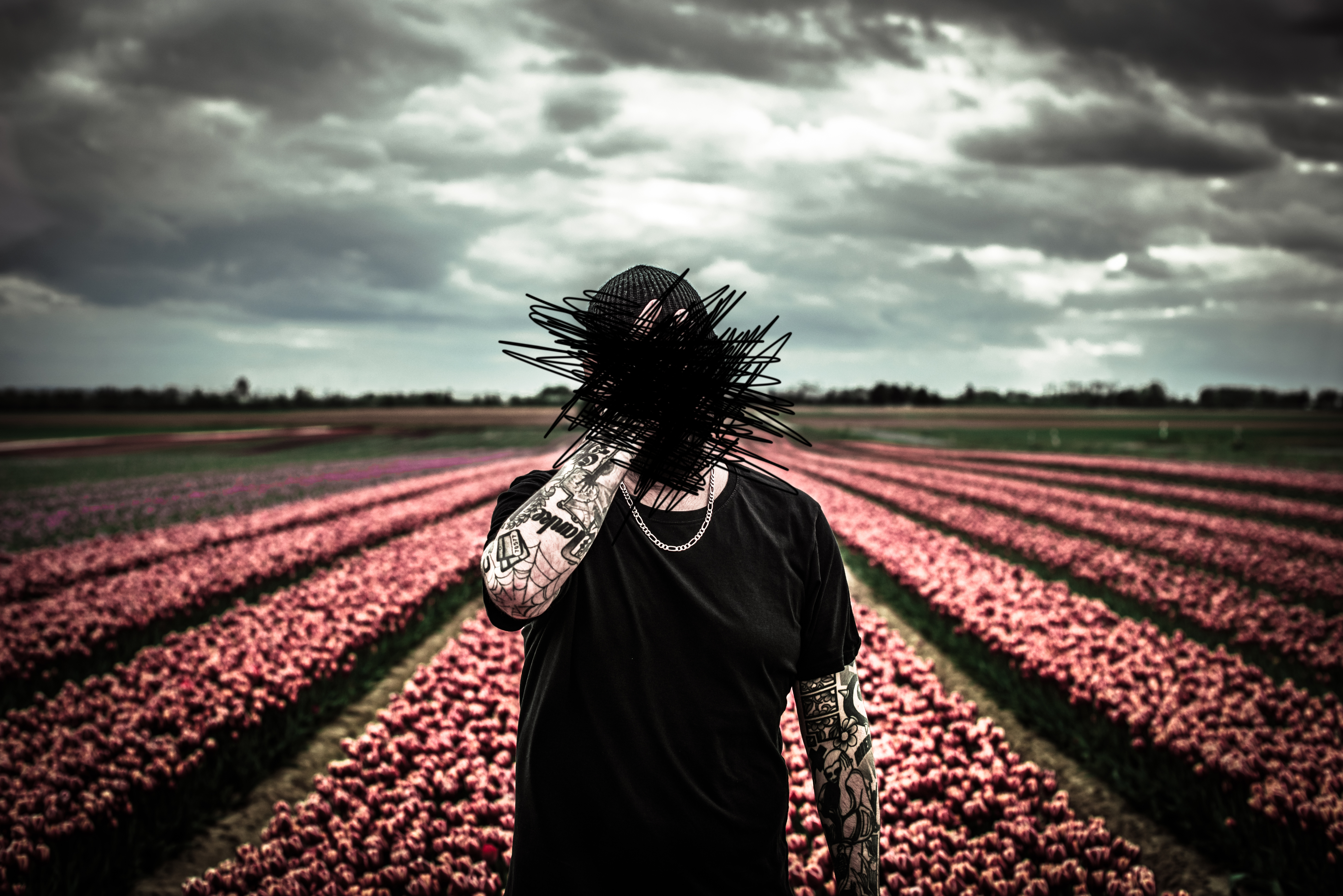 Pressefoto von Destroy Degenhardt